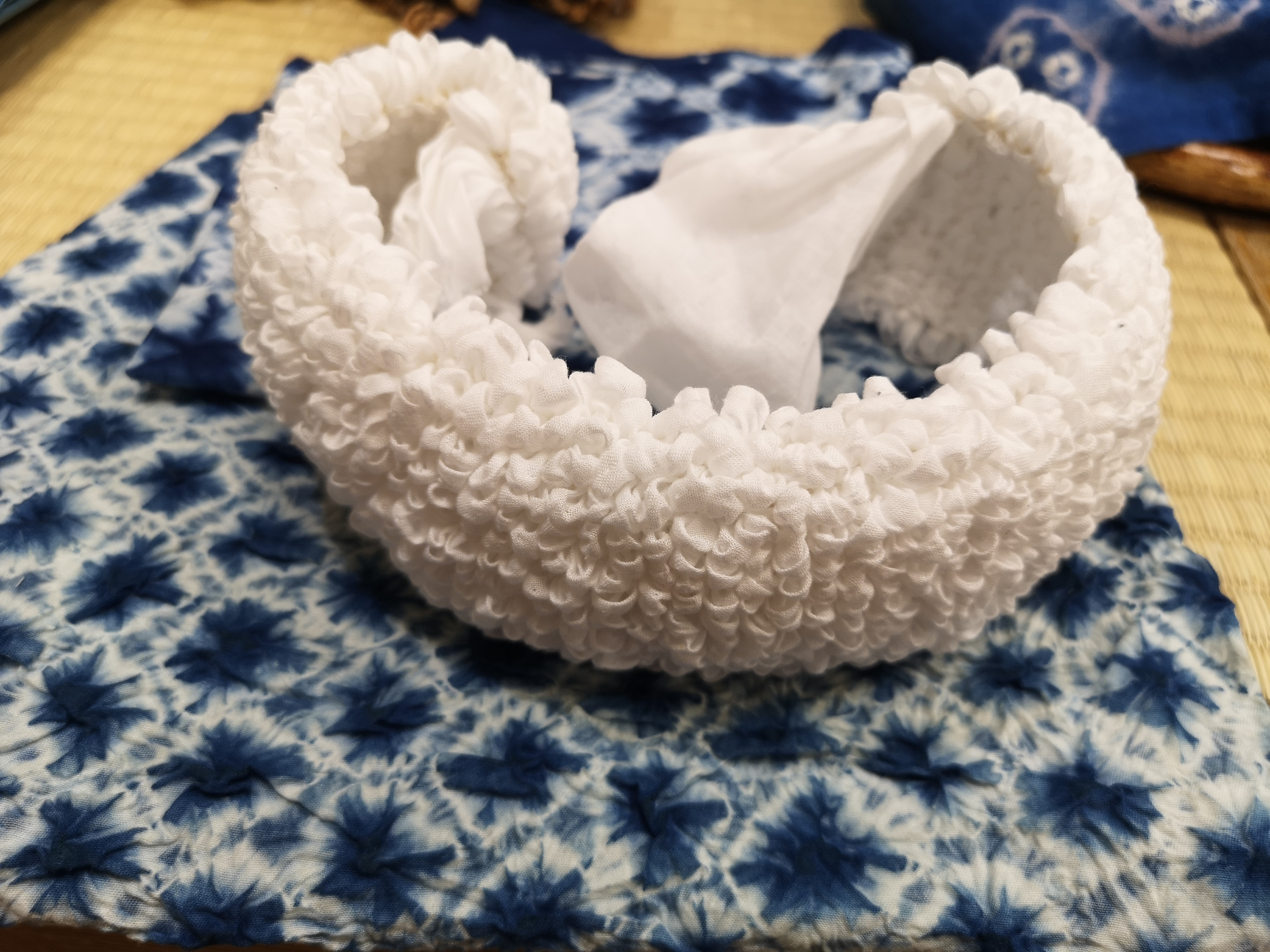 有松絞りの「三浦絞」のくくった布と、染色後の完成品。